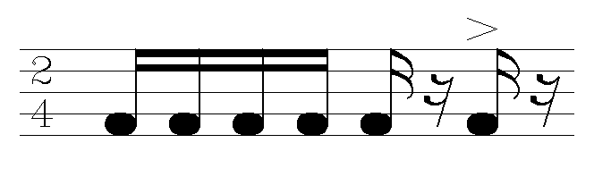 Funaná rhythm model